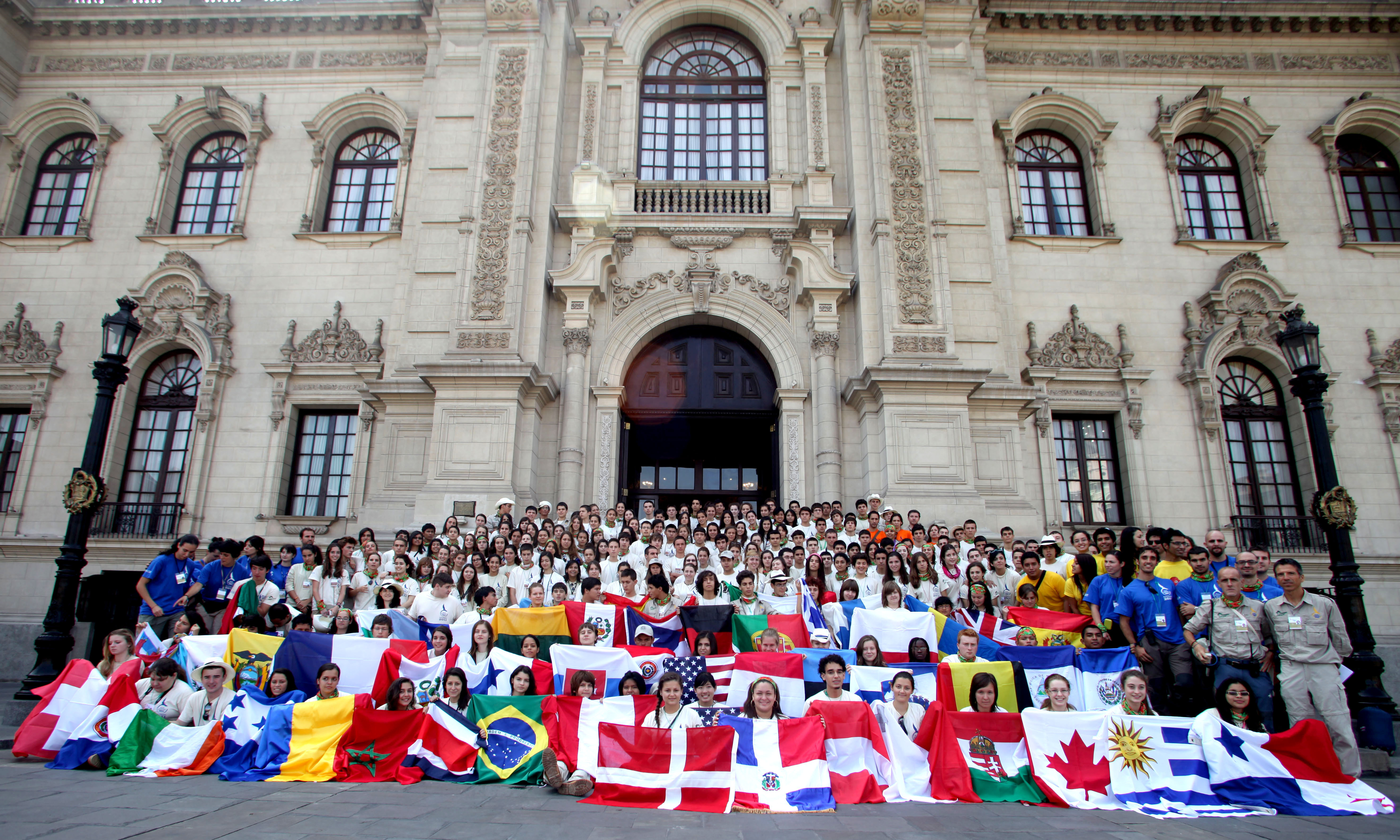 Ruta Quetzal 2011 - Foto de grupo frente Palacio del Gobierno de Perú (Lima).